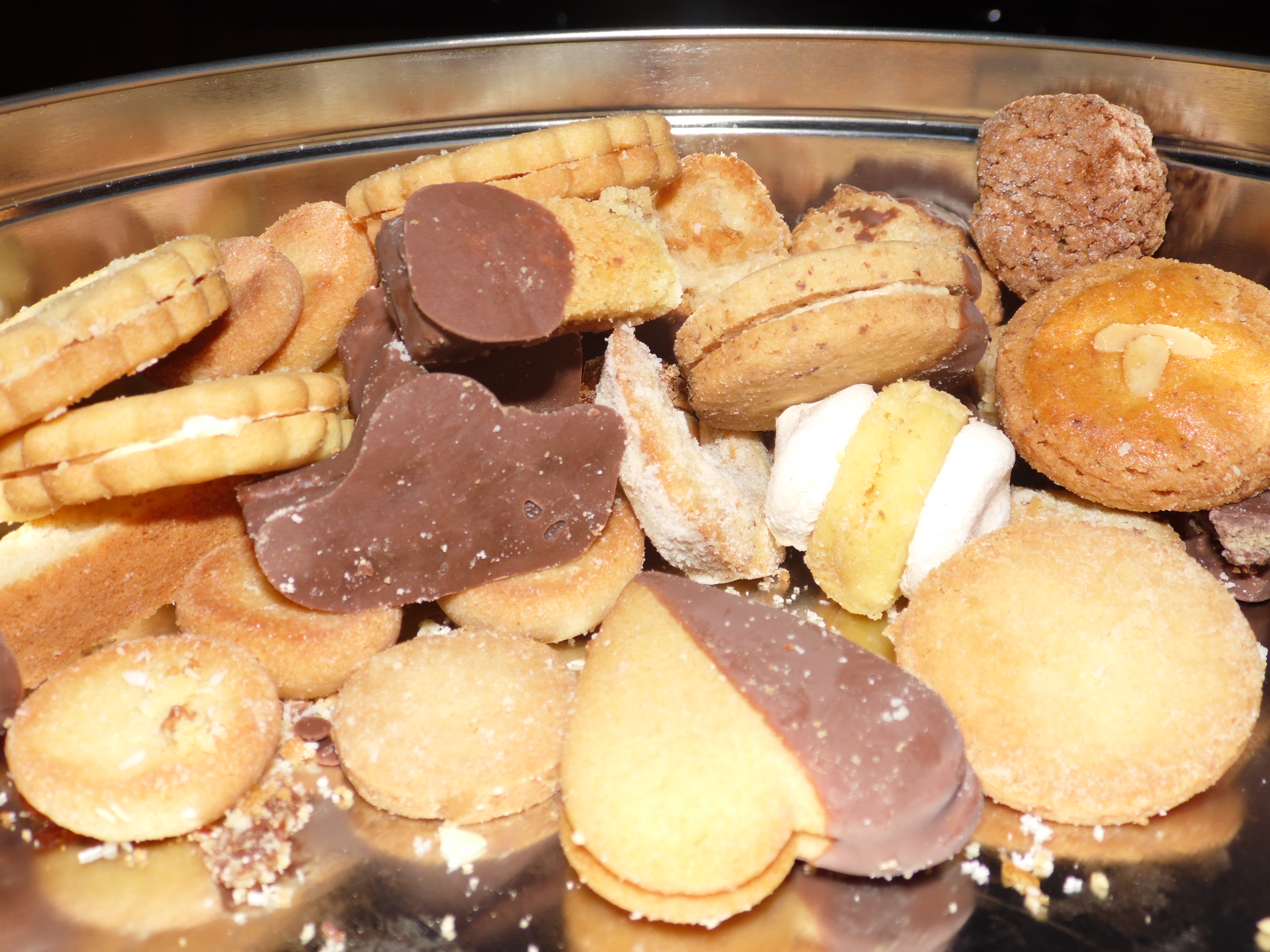 Verschiedene Weihnachtskekse